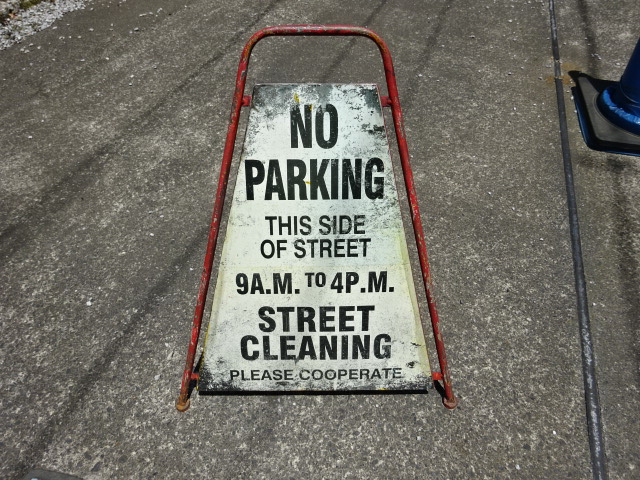 洋風の家の駐車場に、当時の物と思われる英字の立て看板発見ｗ